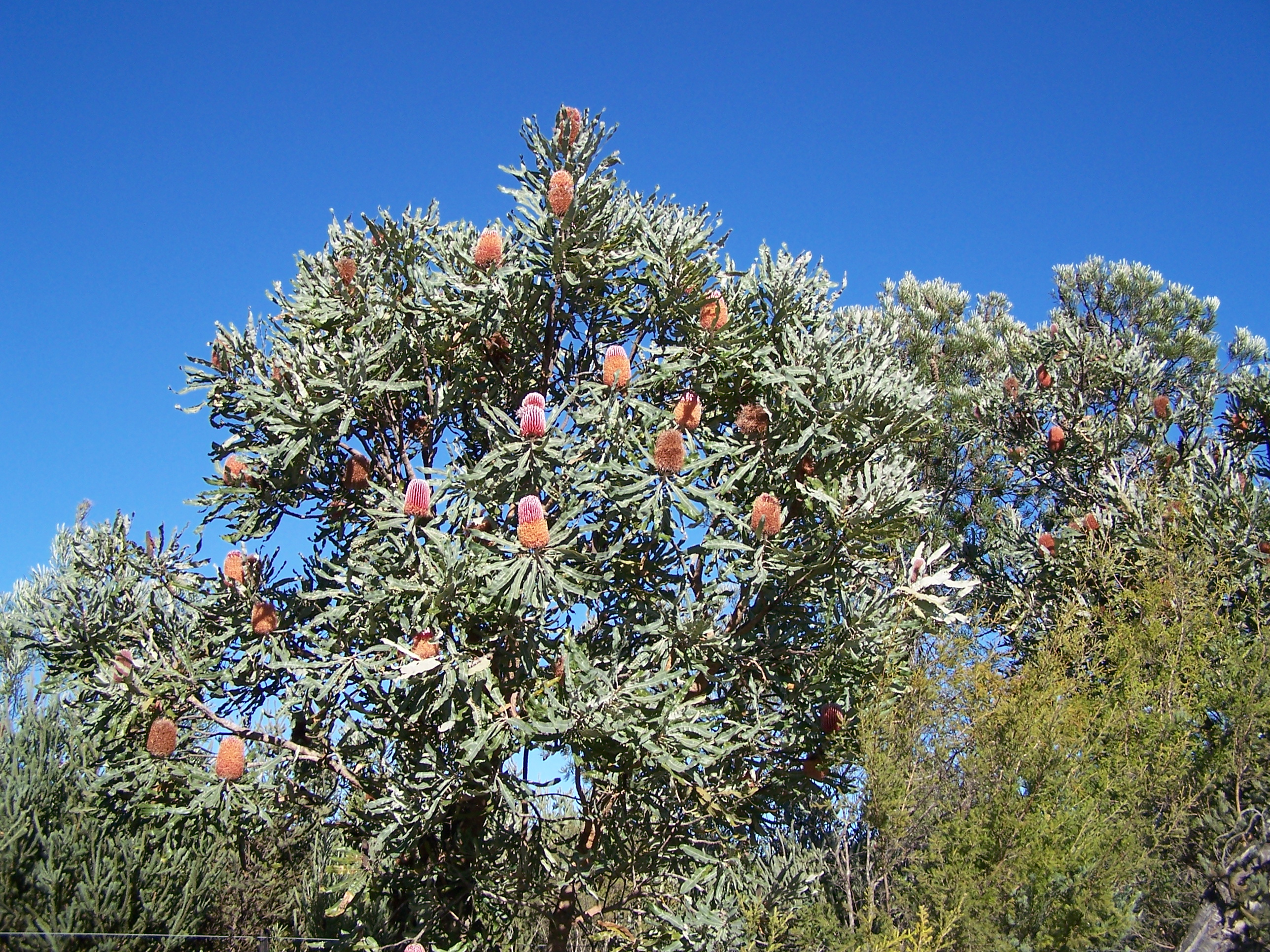 Banksia menziesii